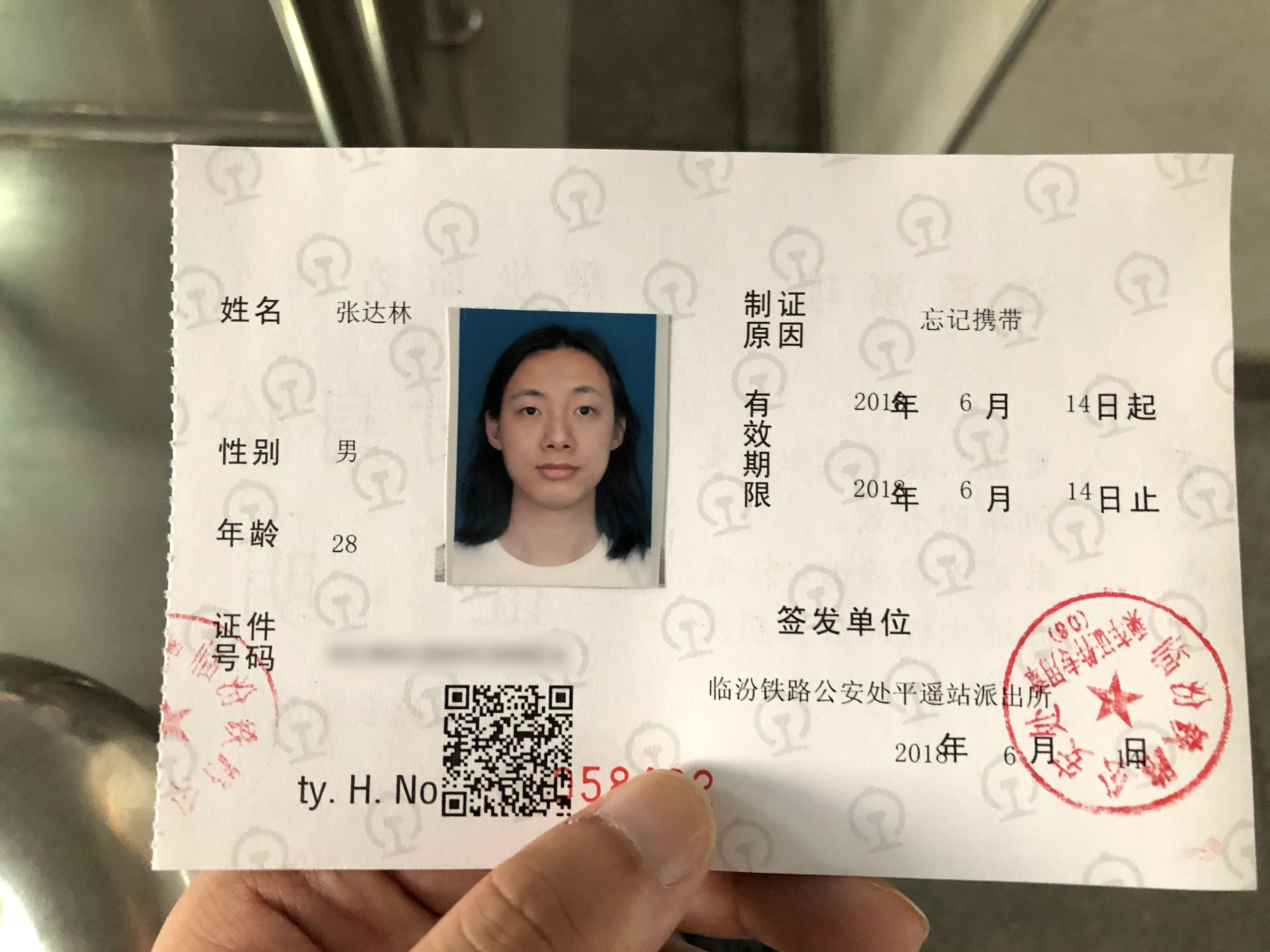 中文（中国大陆）: 临时乘车证明